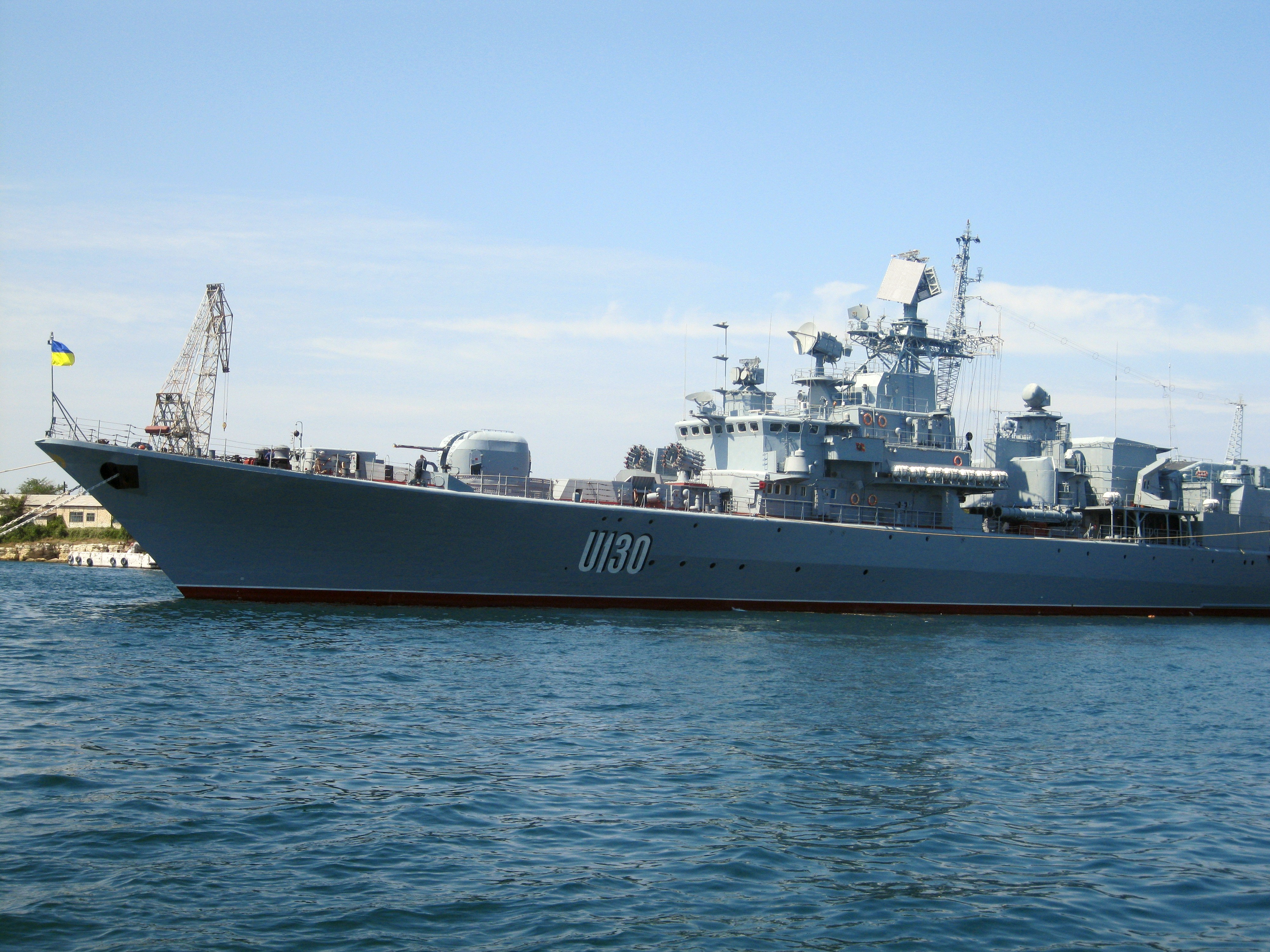 Фрегат "Гетьман Сагайдачний", вигляд збоку.